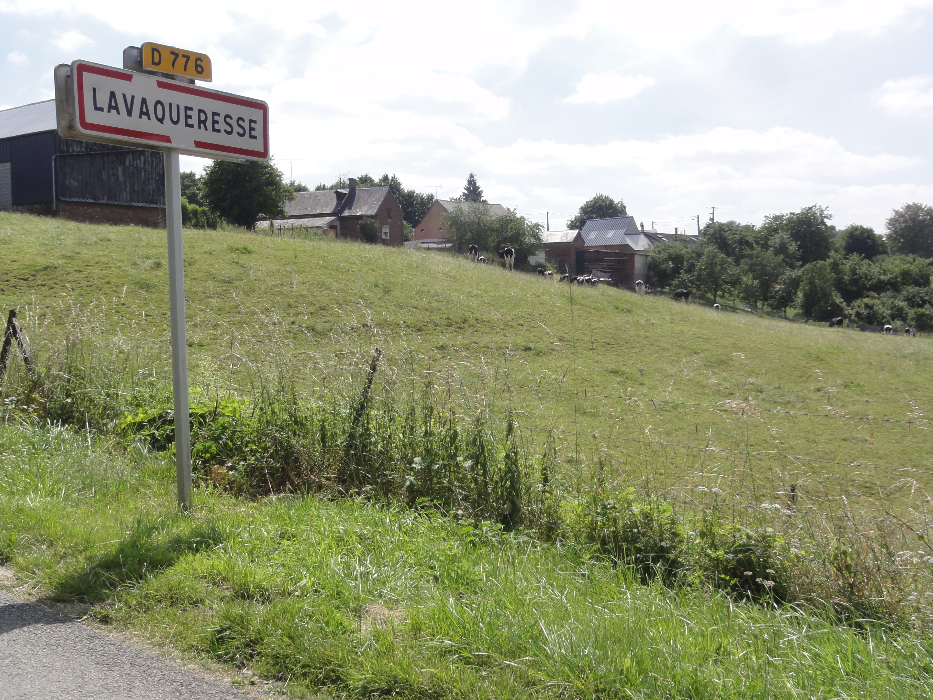 Lavaqueresse (Aisne) city limit sign